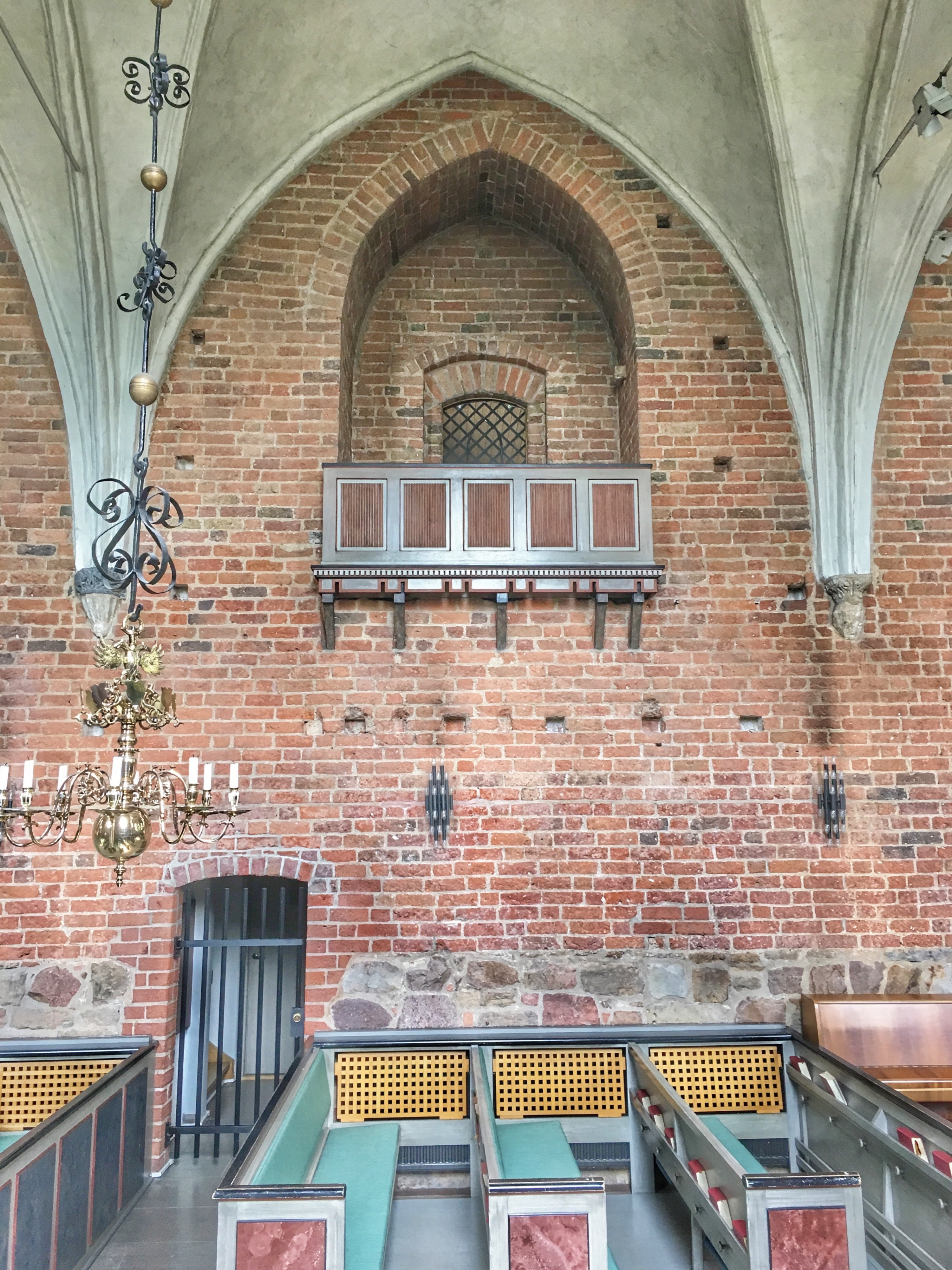 Priorindens stol på nordvæggen i Sankt Peters klosterkirke, Lund